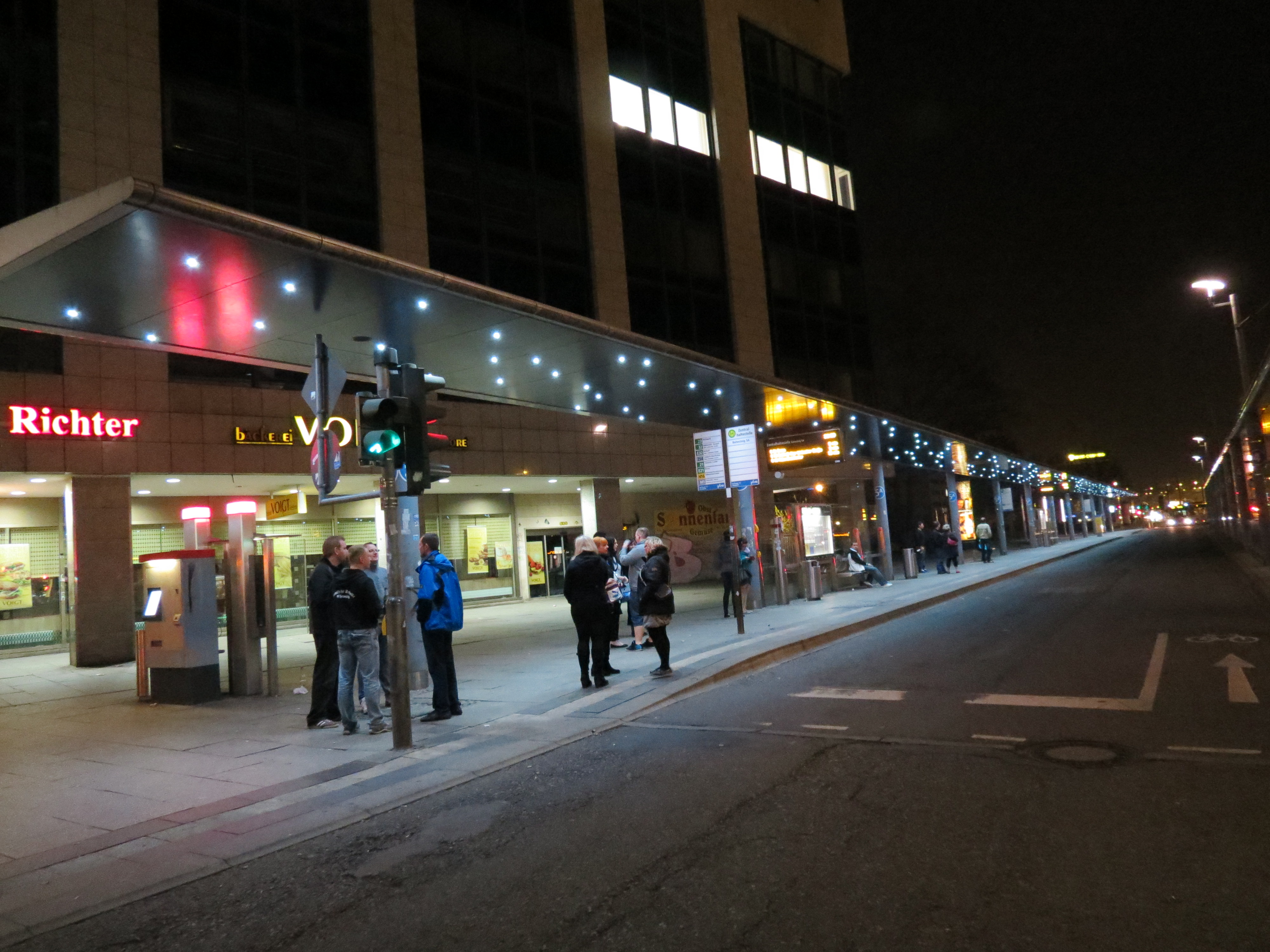 Der "Sternenhimmel" nach dem Umbau an der Zentralhaltestelle, hier Bussteig 5.